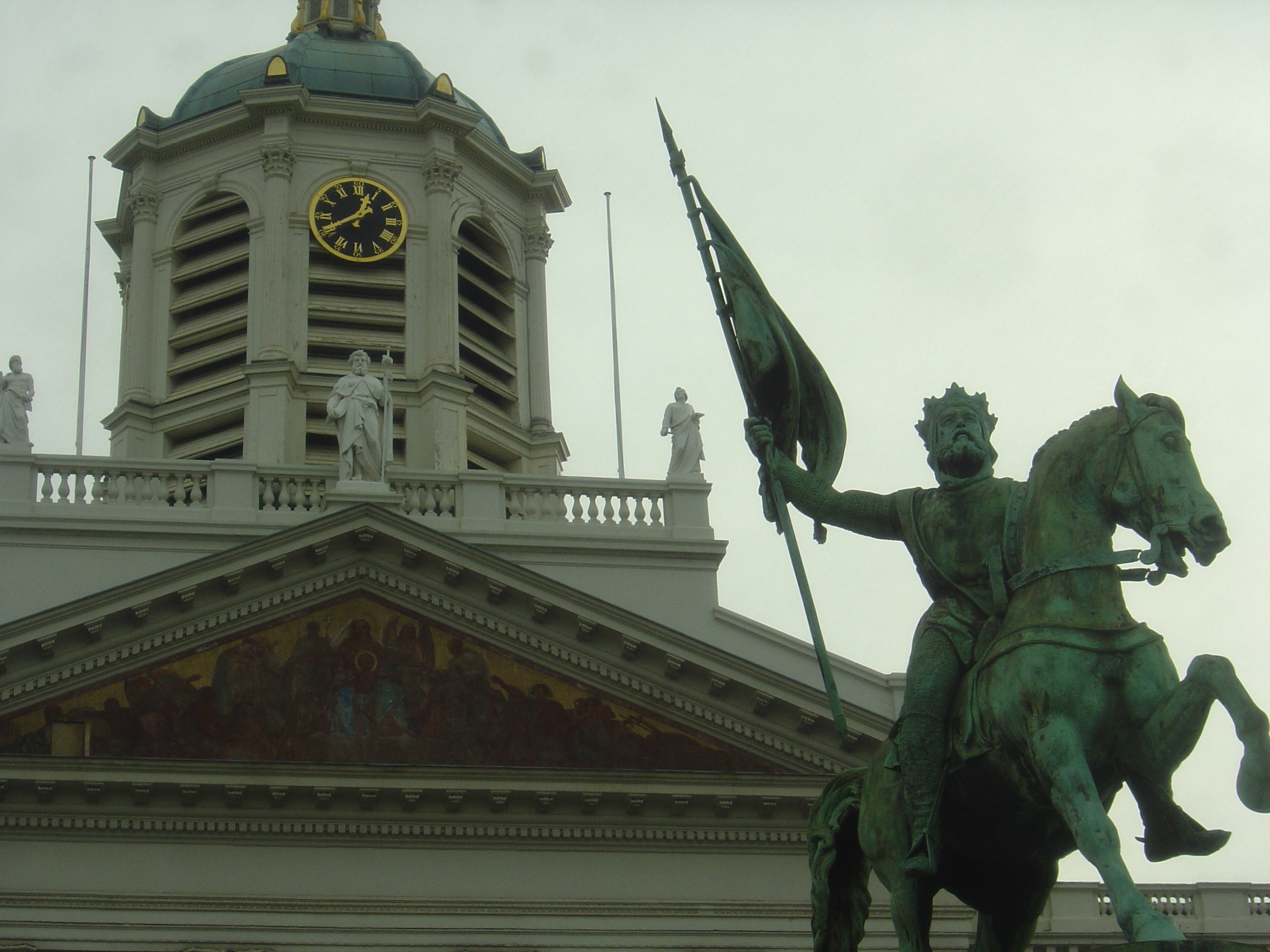 Έφιππος ανδριάντας του Γοδεφρείδου ντε Μπουγιόν στις Βρυξέλλες.